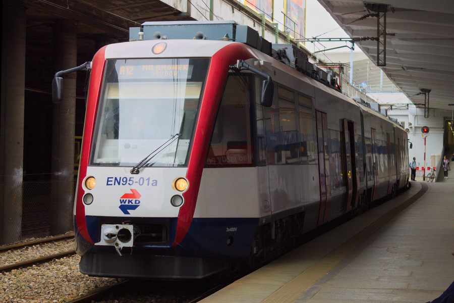 Elektryczny zespół trakcyjny Pesa Mazovia EN95-01 oczekuje na stacji Warszawa Śródmieście WKD na odjazd jako pociąg WKD 223 linii A12 do Milanówka Grudów.